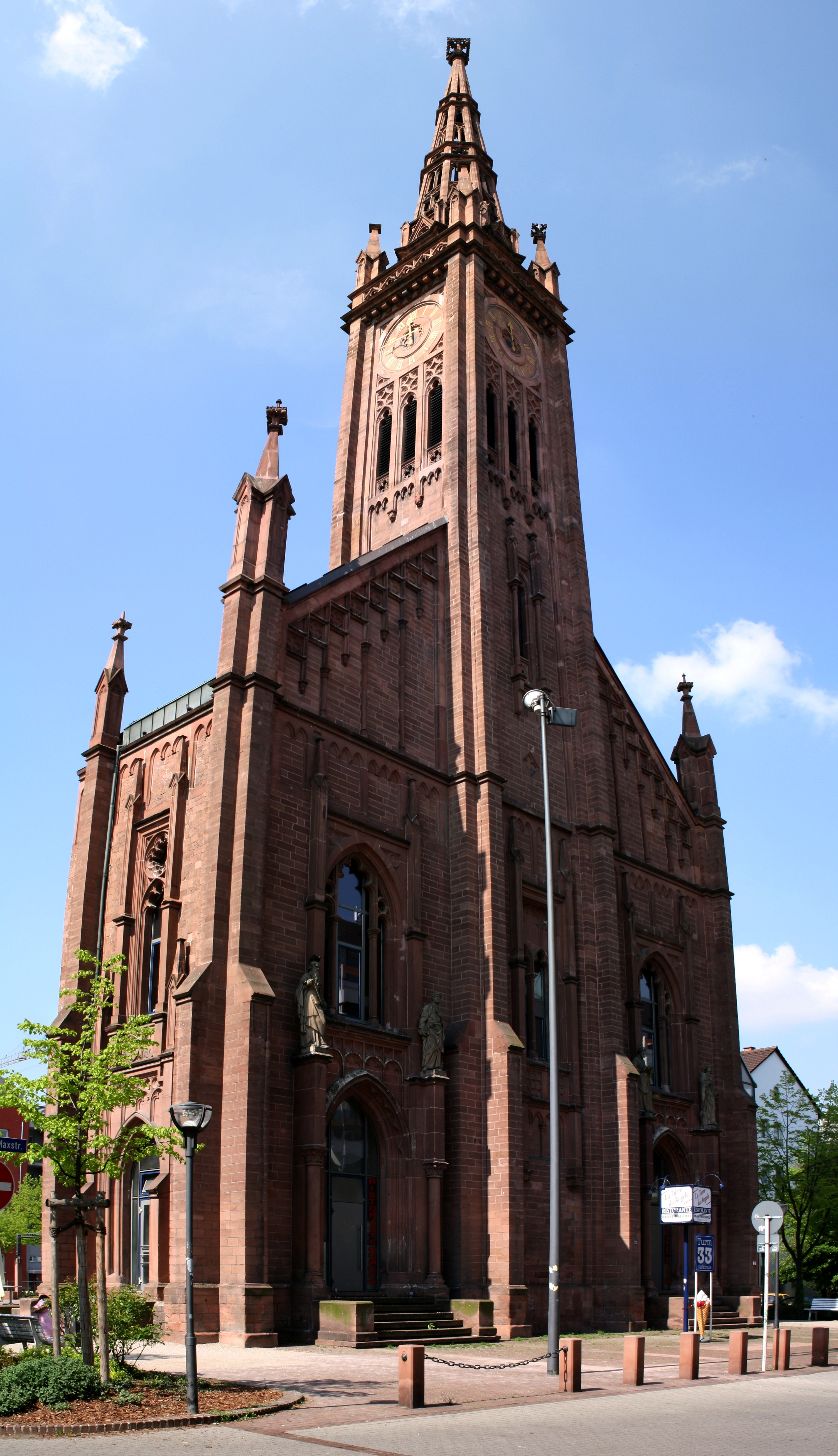 Bild der Lutherkirche in Ludwigshafen am Rhein; aufgenommen 2008, zeigt es die Vorderseite der Kirche mit dem Turmcafe; Ein Stitch aus 6 Einzelbildern